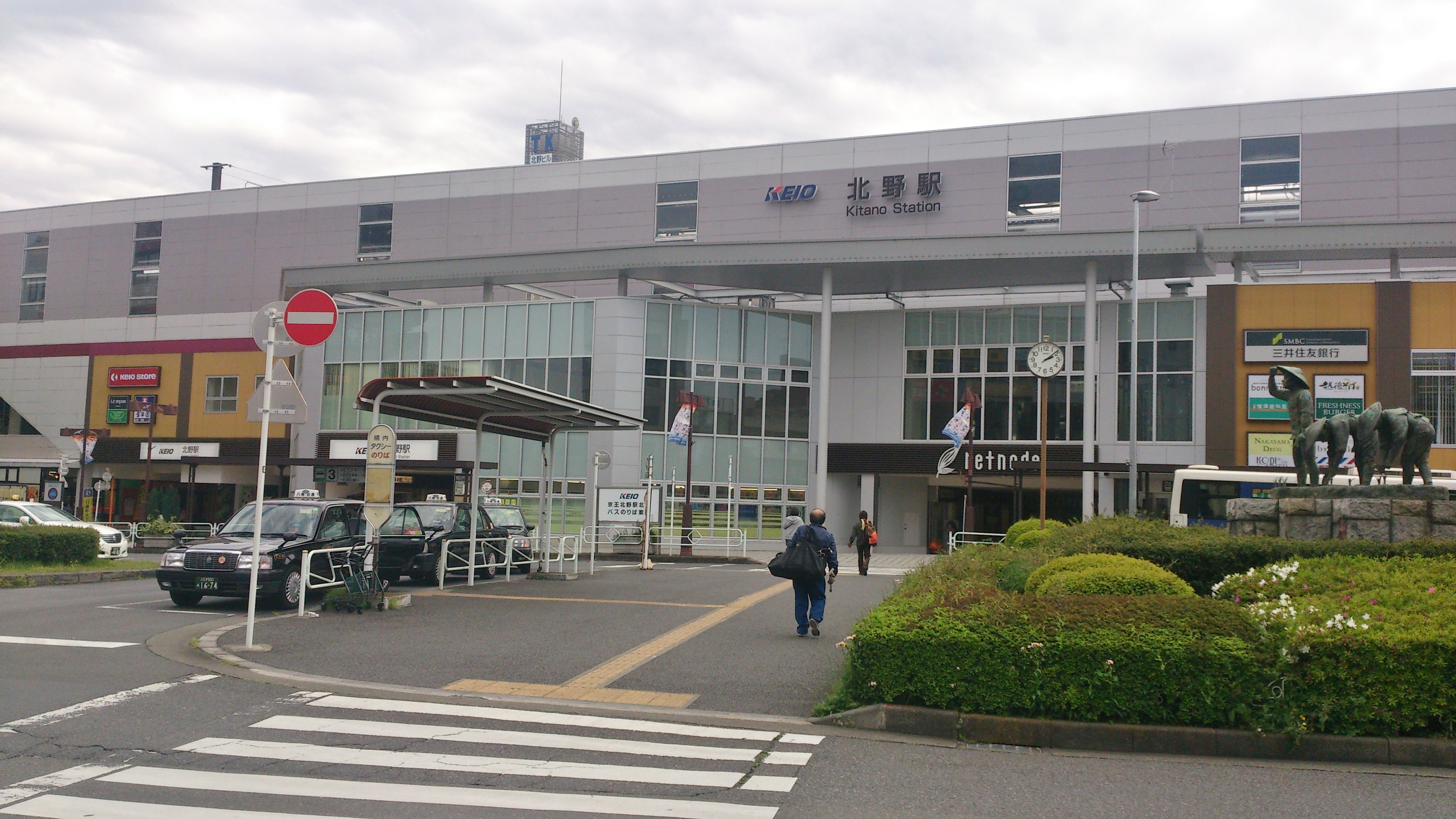 京王線北野駅の外観。